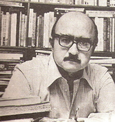 jorge lafforgue editor y escritor argentino